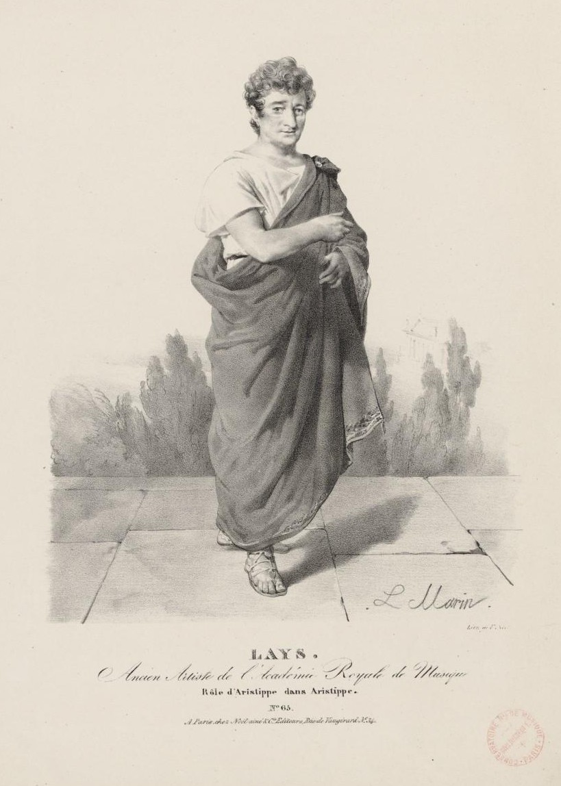 François Lays, nel ruolo di Aristippo nell'opera "Aristippe" / litografia da un ritratto di L. Marin (1800)